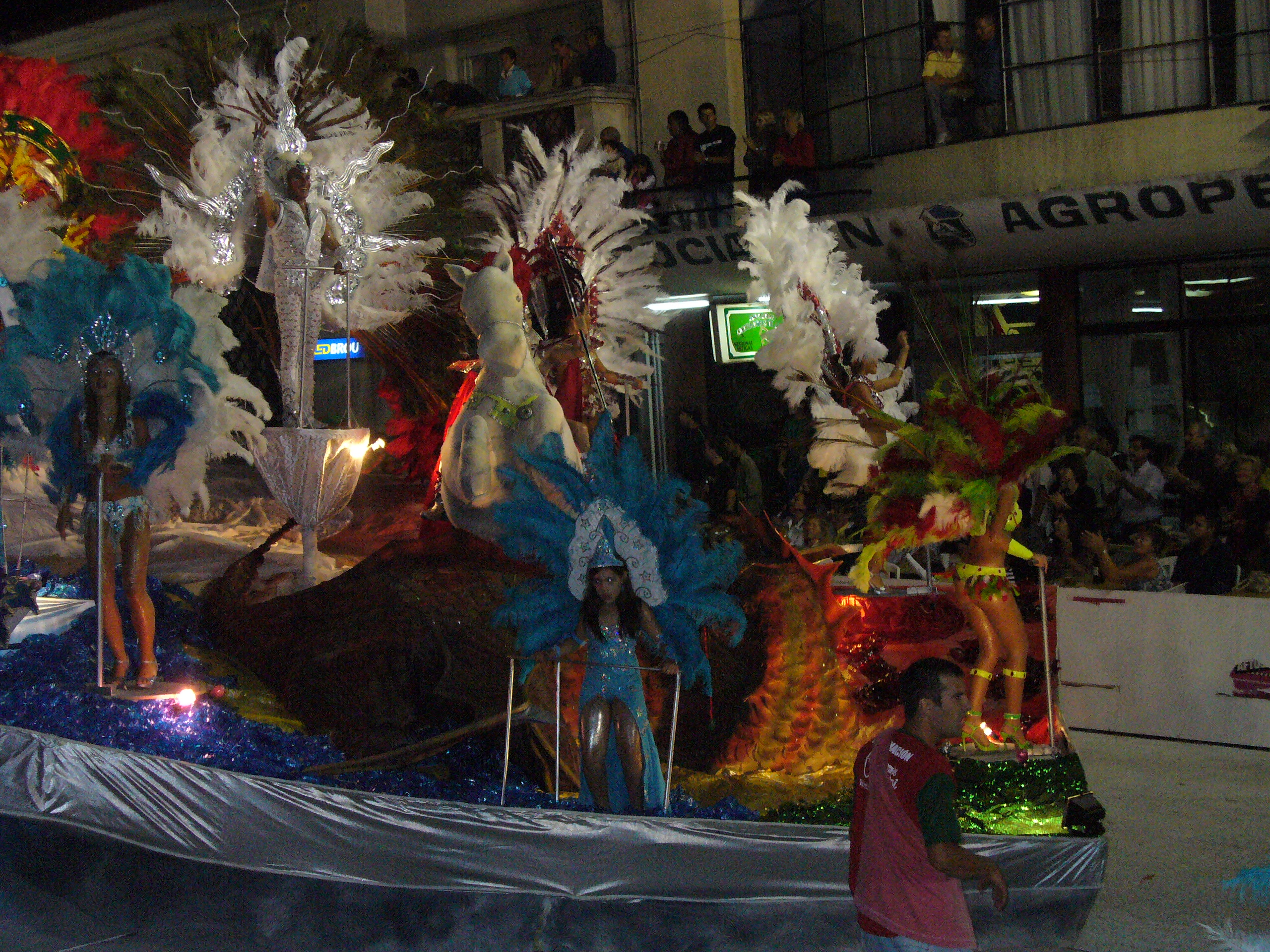 Karneval i Artigas.